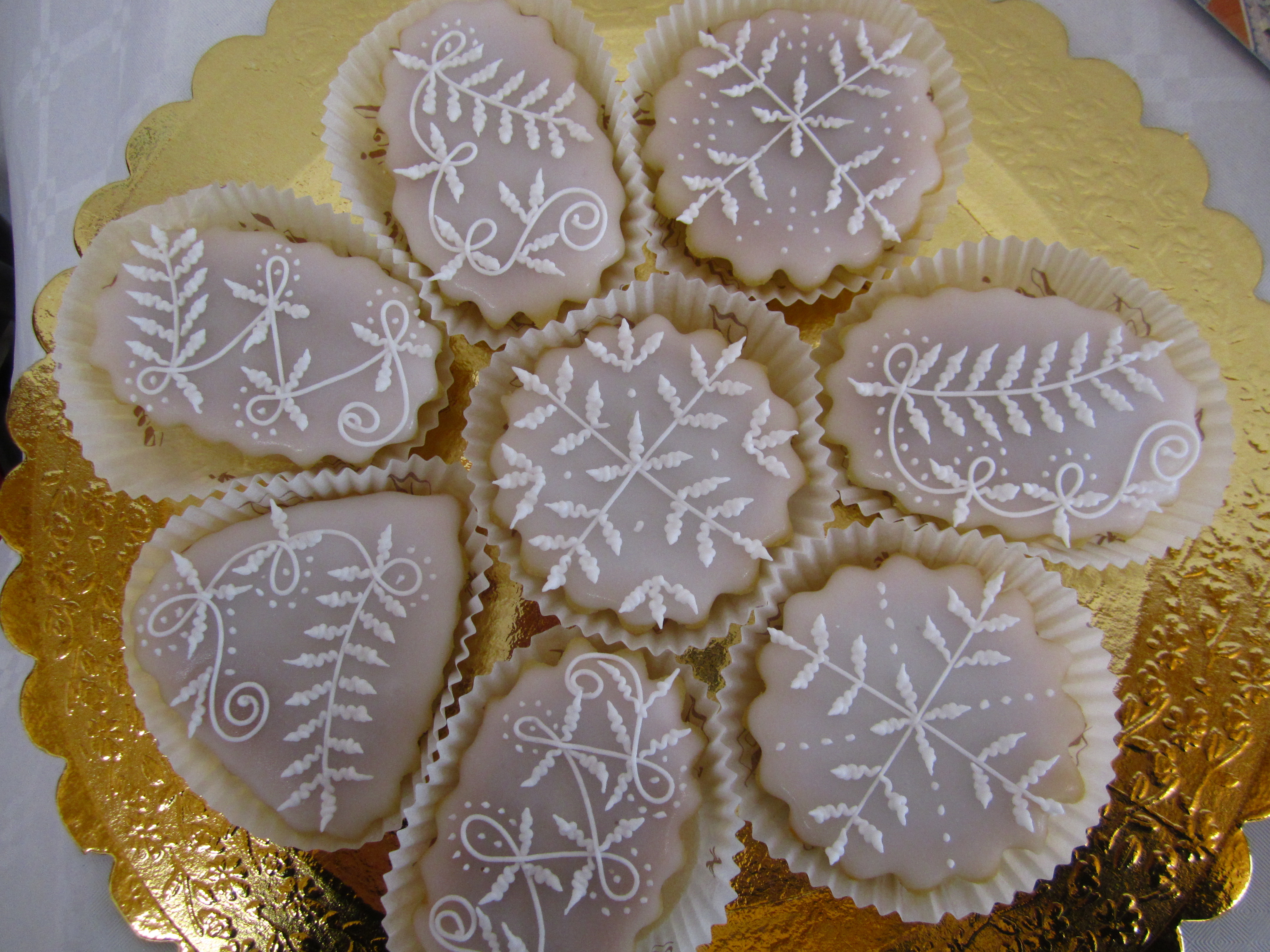 C.Mura, foto propria, Dolci tipici di Borore.